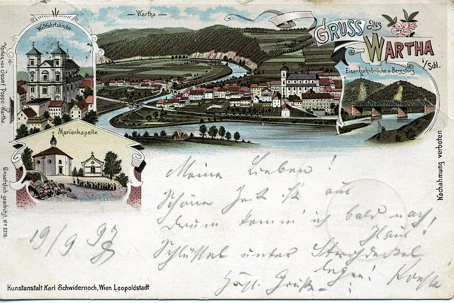 Wallfahrtskirche - Marienkapelle -Eisenbahnbrücke u.Bergsturz